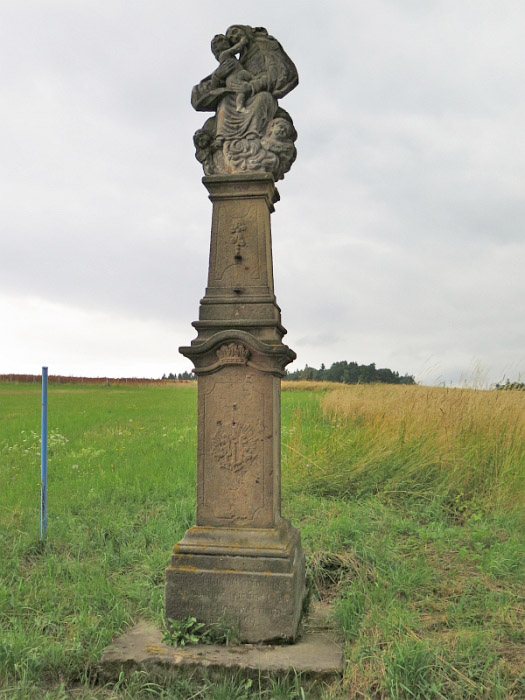 Socha Panny Marie Pomocné, Jakubovice (Dolní Čermná).